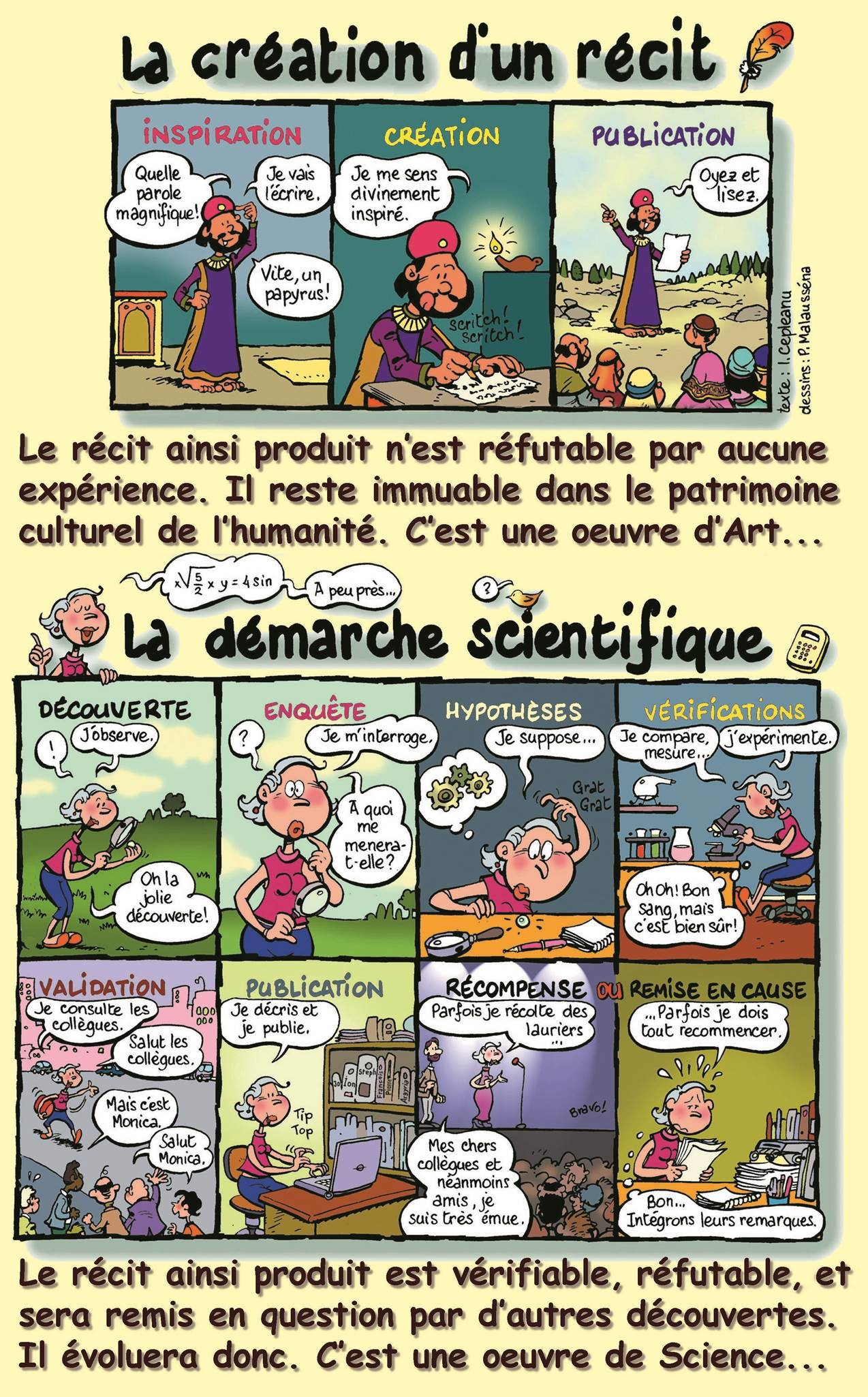 BD décrivant les démarches littéraire et scientifique